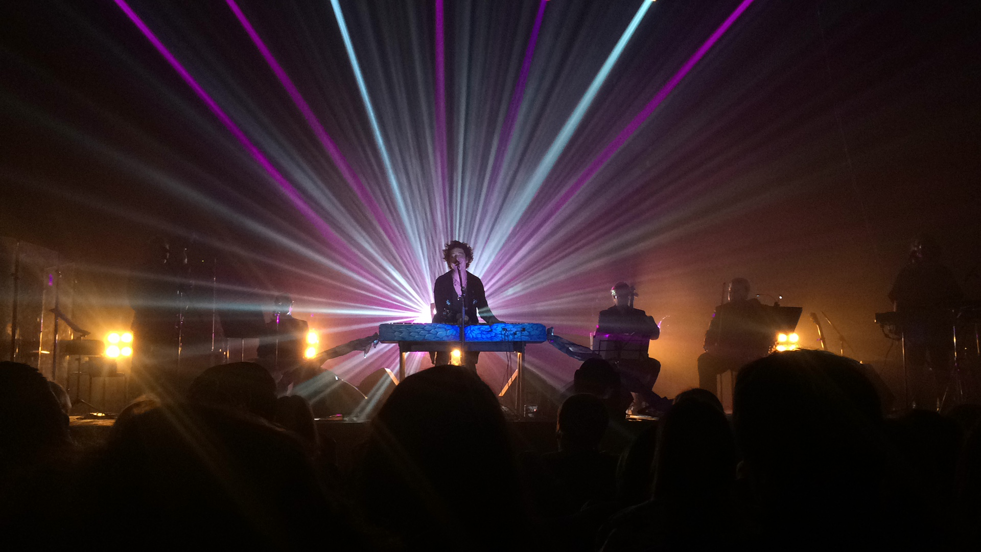 Концерт Pianoboy з камерним оркестром у Одессі 17-02-2017